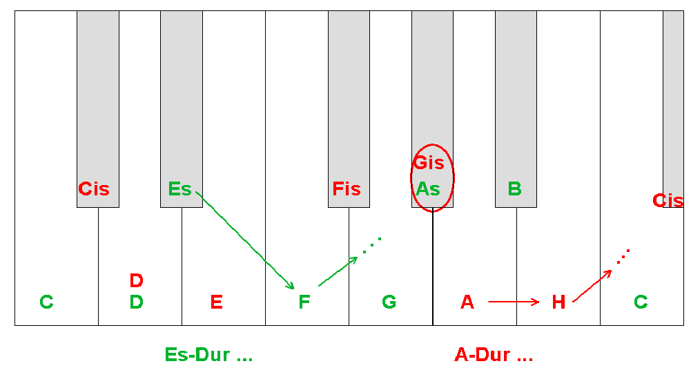 Tastatur mit Beschriftung Es-Dur A-Dur gezeichnet mit Strecke (-7,9|5,9) (16,1|5,9) Strecke (16,1|5,9) (16,1|-6,1) Strecke (16,1|-6,1) (-7,9|-6,1) Strecke (-4,9|-6,1) (-4,9|-1,6) Strecke (-1,9|-6,1) (-1,9|-1,6) Strecke (1,1|-6,1) (1,1|5,9) Strecke (4,1|-6,1) (4,1|-1,6) Strecke (7,1|-6,1) (7,1|-1,6) Strecke (10,1|-6,1) (10,1|-1,6) Strecke (13,1|-6,1) (13,1|5,9) Strecke (16,1|-1,6) (15,35|-1,6) Strecke (15,35|-1,6) (15,35|5,9) Strecke (10,85|5,9) (10,85|-1,6) Strecke (10,85|-1,6) (9,35|-1,6) Strecke (9,35|-1,6) (9,35|5,9) Strecke (7,85|5,9) (7,85|-1,6) Strecke (7,85|-1,6) (6,35|-1,6) Strecke (6,35|-1,6) (6,35|5,9) Strecke (4,85|5,9) (4,85|-1,6) Strecke (4,85|-1,6) (3,35|-1,6) Strecke (3,35|-1,6) (3,35|5,9) Strecke (-7,9|-6,1) (-7,9|5,9) Strecke (-5,65|5,9) (-5,65|-1,6) Strecke (-5,65|-1,6) (-4,15|-1,6) Strecke (-4,15|-1,6) (-4,15|5,9) Strecke (-2,65|-1,6) (-1,15|-1,6) Strecke (-1,15|-1,6) (-1,15|5,9) Strecke (-2,65|-1,6) (-2,65|5,9) Text a20 fett (2,3|-4,8) F @grün Text a20 fett (5,3|-4,8) G @grün Text a20 fett (14,3|-4,8) C @grün Text a20 fett (-7|-4,8) C @grün Text a20 fett (-3,78|-4,8) D @grün Text a20 fett (-0,89|-4,8) E @rot Text a20 fett (11,36|-4,8) H @rot Text a20 fett (8,3|-4,8) A-Dur @rot Text a20 fett (-2,4|-0,5) Es-Dur @grün Text a20 fett (6,5|-0,5) As @grün Text a20 fett (9,78|-0,5) B @grün Text a20 fett (-5,6|-0,5) Cis @rot Text a20 fett (-3,78|-4) D @rot Text a20 fett (3,5|-0,5) Fis @rot Text a20 fett (6,4|0,5) Gis @rot Vektorm (9,3|-5,4) (11,1|-5,4) @rot { Vektorm (-1,2|-1,1) (1,6|-1,1) @grün { Fuellfarbe 220 220 220 Polygon (-5,65|5,9) (-5,65|-1,6) (-4,15|-1,6) (-4,15|5,9) @grün { Polygon (-2,65|5,9) (-2,65|-1,6) (-1,15|-1,6) (-1,15|5,9) @grün { Polygon (3,35|5,9) (3,35|-1,6) (4,85|-1,6) (4,85|5,9) @grün { Polygon (6,35|5,9) (6,35|-1,6) (7,85|-1,6) (7,85|5,9) @grün { Polygon (9,35|5,9) (9,35|-1,6) (10,85|-1,6) (10,85|5,9) @grün { Polygon (15,35|5,9) (15,35|-1,6) (16,1|-1,6) (16,1|5,9) @grün { KeineFuellfarbe Ellipse (7,1|-0,5) a=0,8 b=1,3 @rot